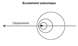 Perturbations en subsonique. Image personnelle. Domaine public.